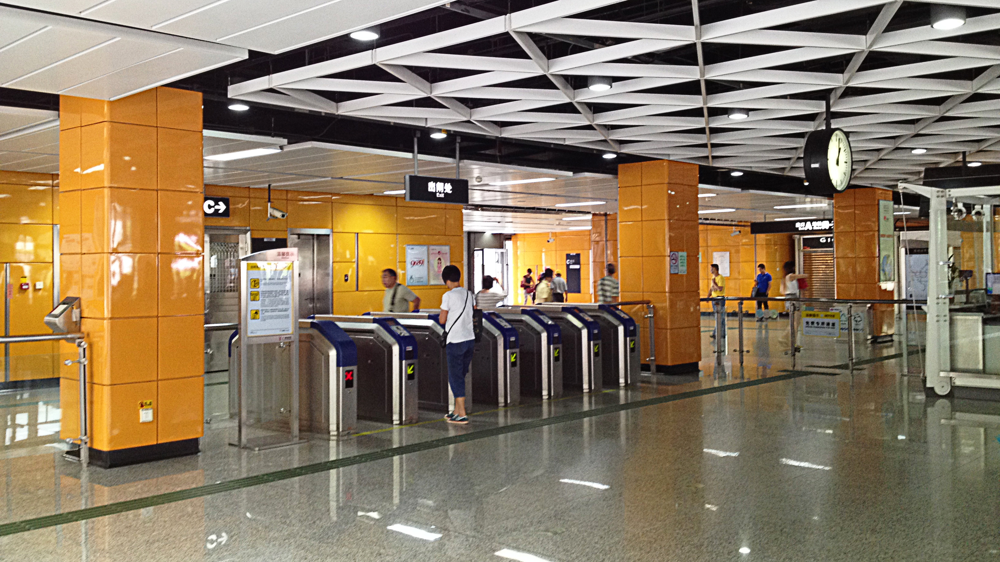 广州地铁西场站南站厅